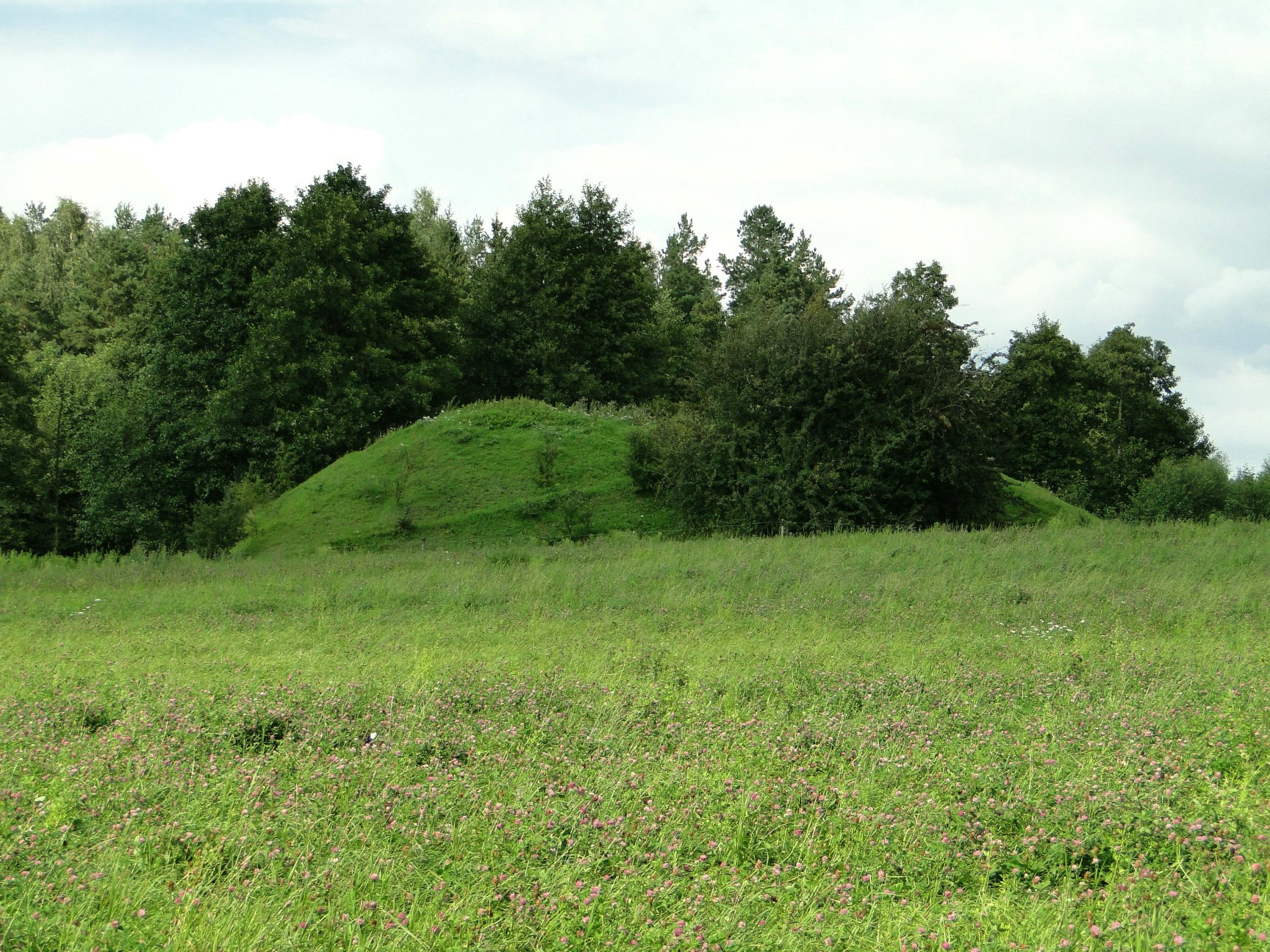 Pozostałości po grodzisku pruskim.